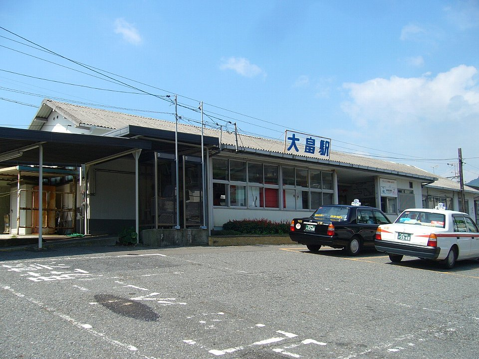 山陽本線大畠駅 駅舎